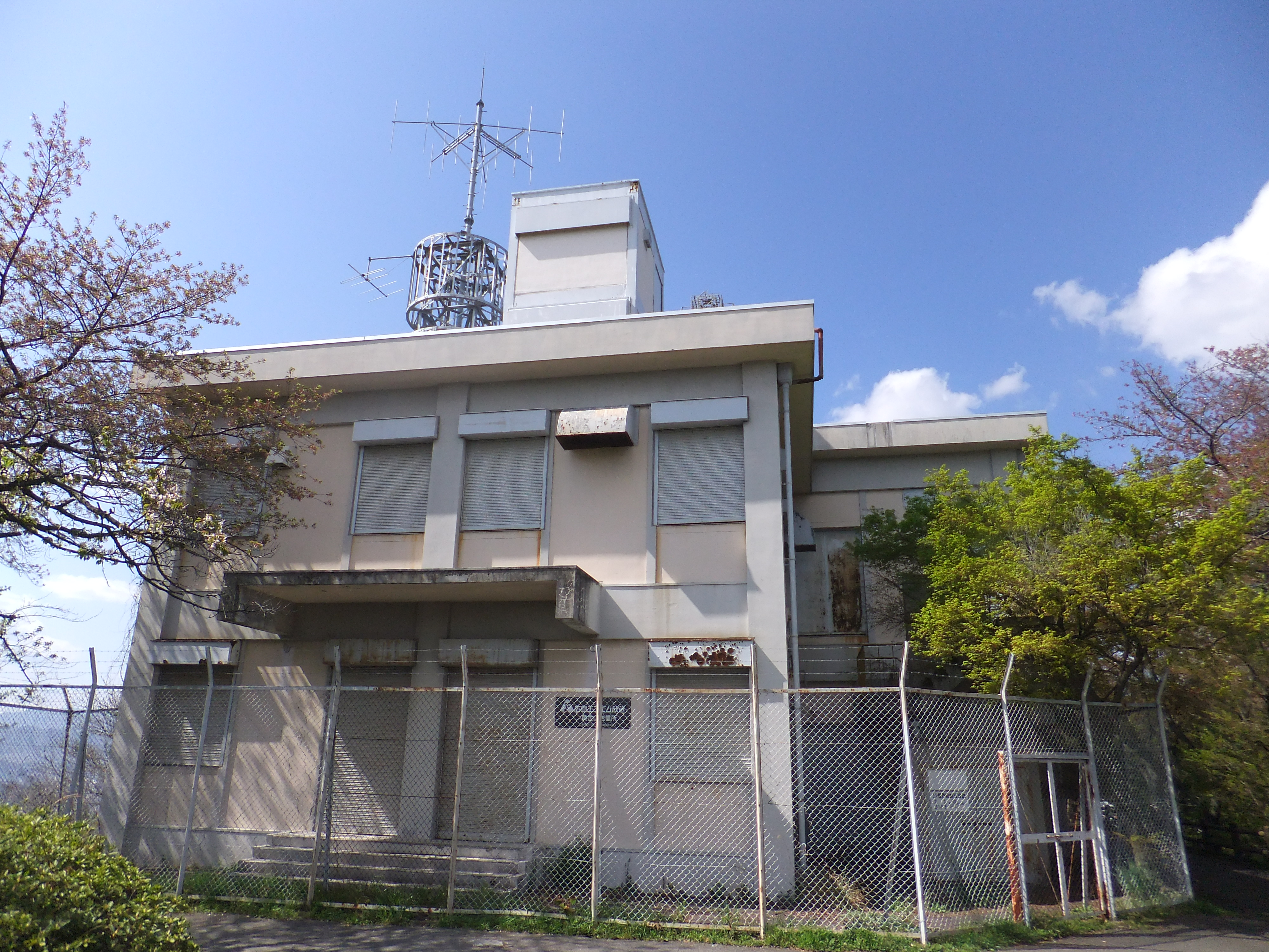 広島FM放送 黄金山送信所